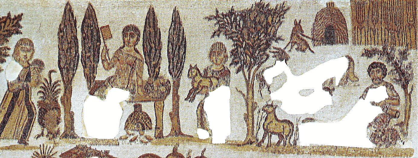 La proprietà del signore Giulio proveniente da Cartagine conservata al Bardo di Tunisi